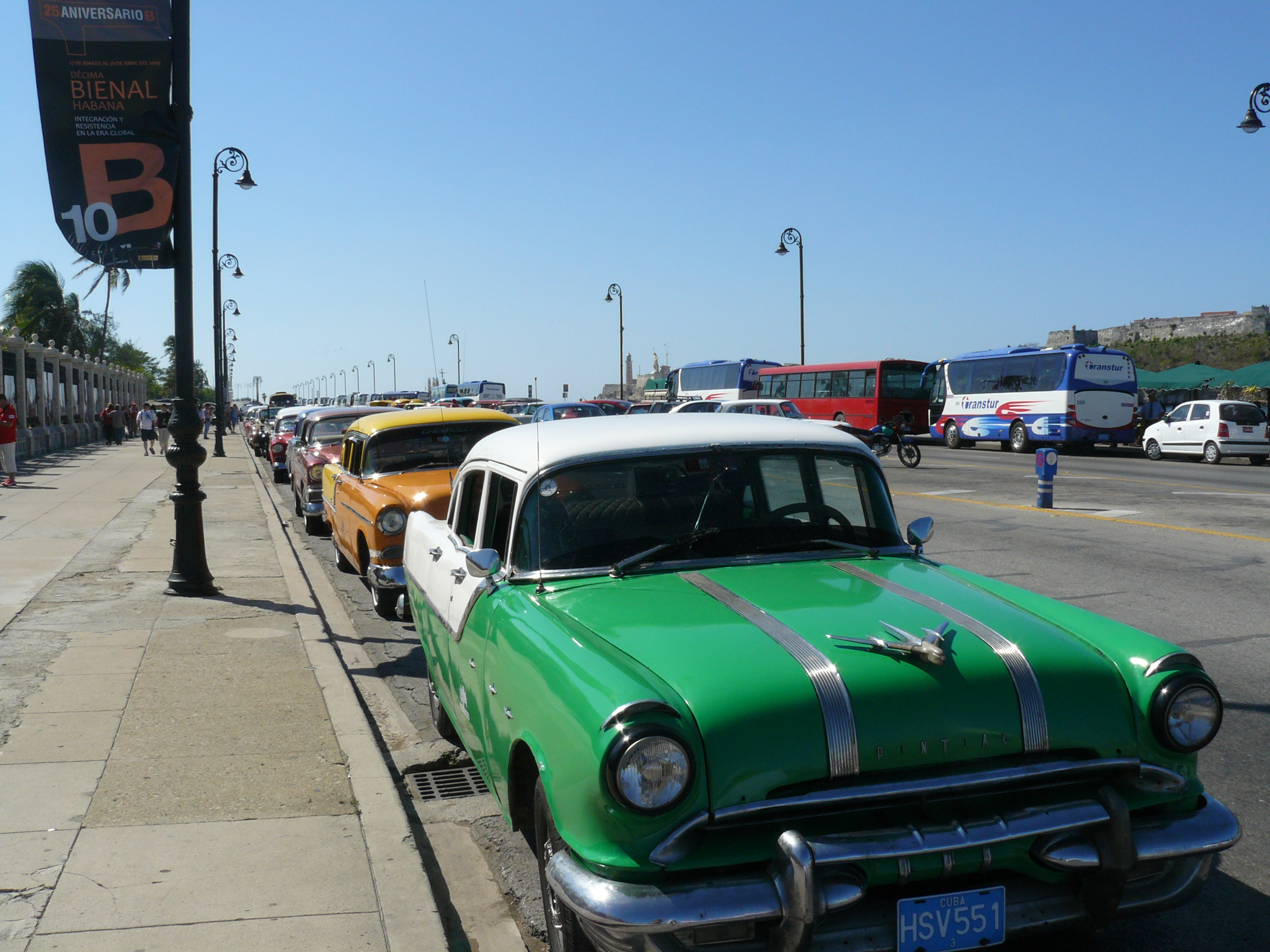 auto en el malecon